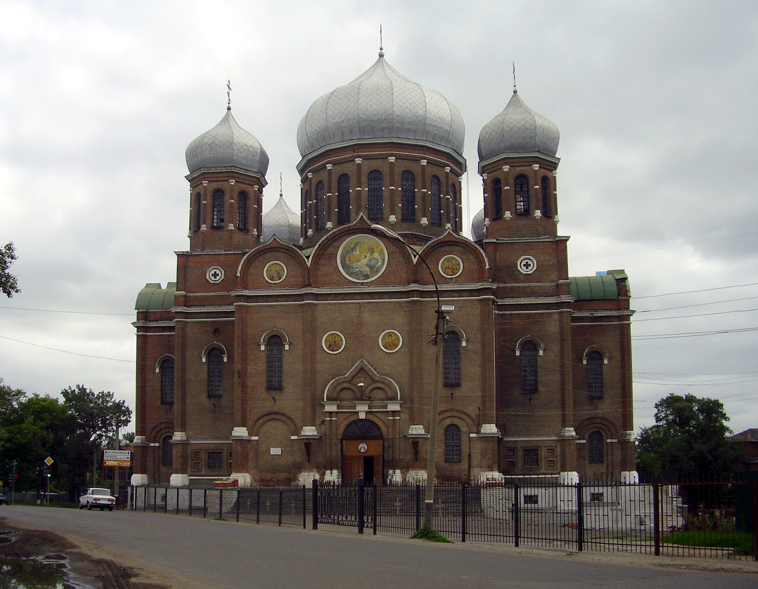 Мичуринск,Боголюбский_собор